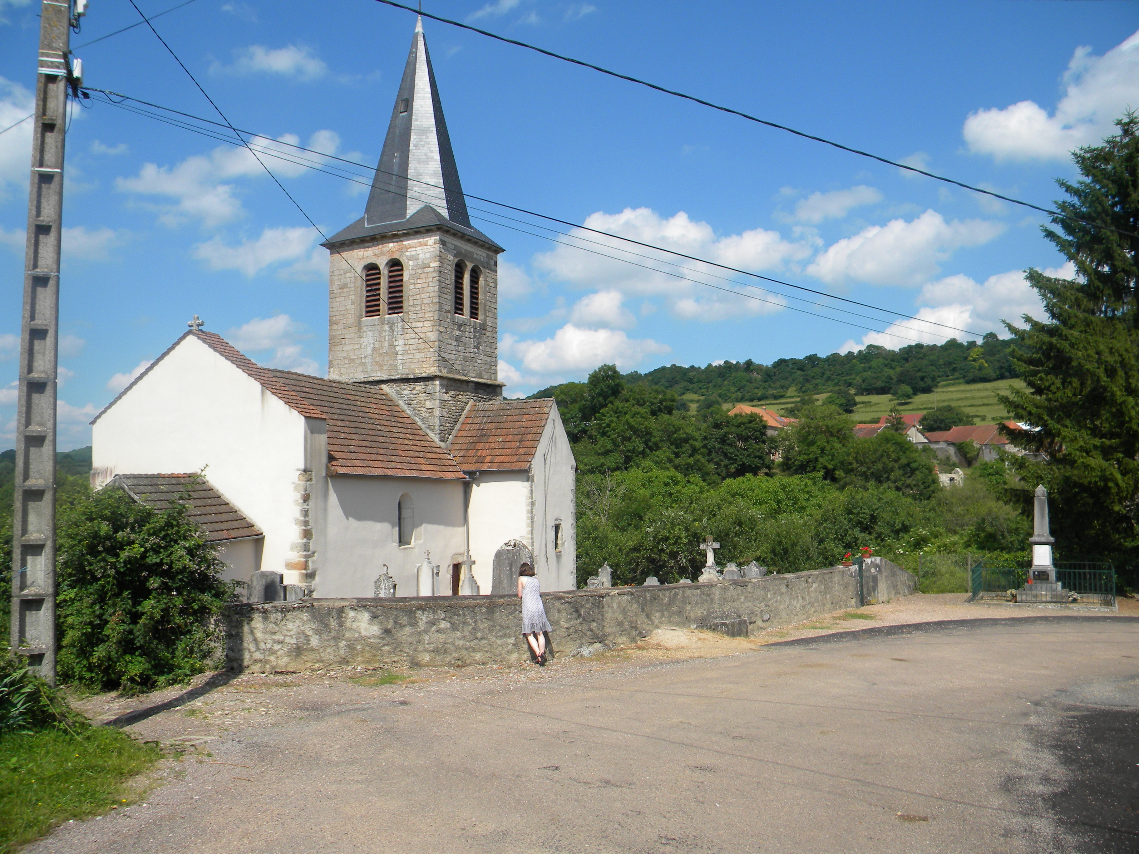 Église saint Germain à Santosse